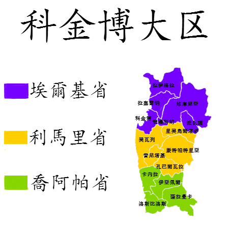 科金博的IV区是十五个地区中，行政上划分政治和智利之一。